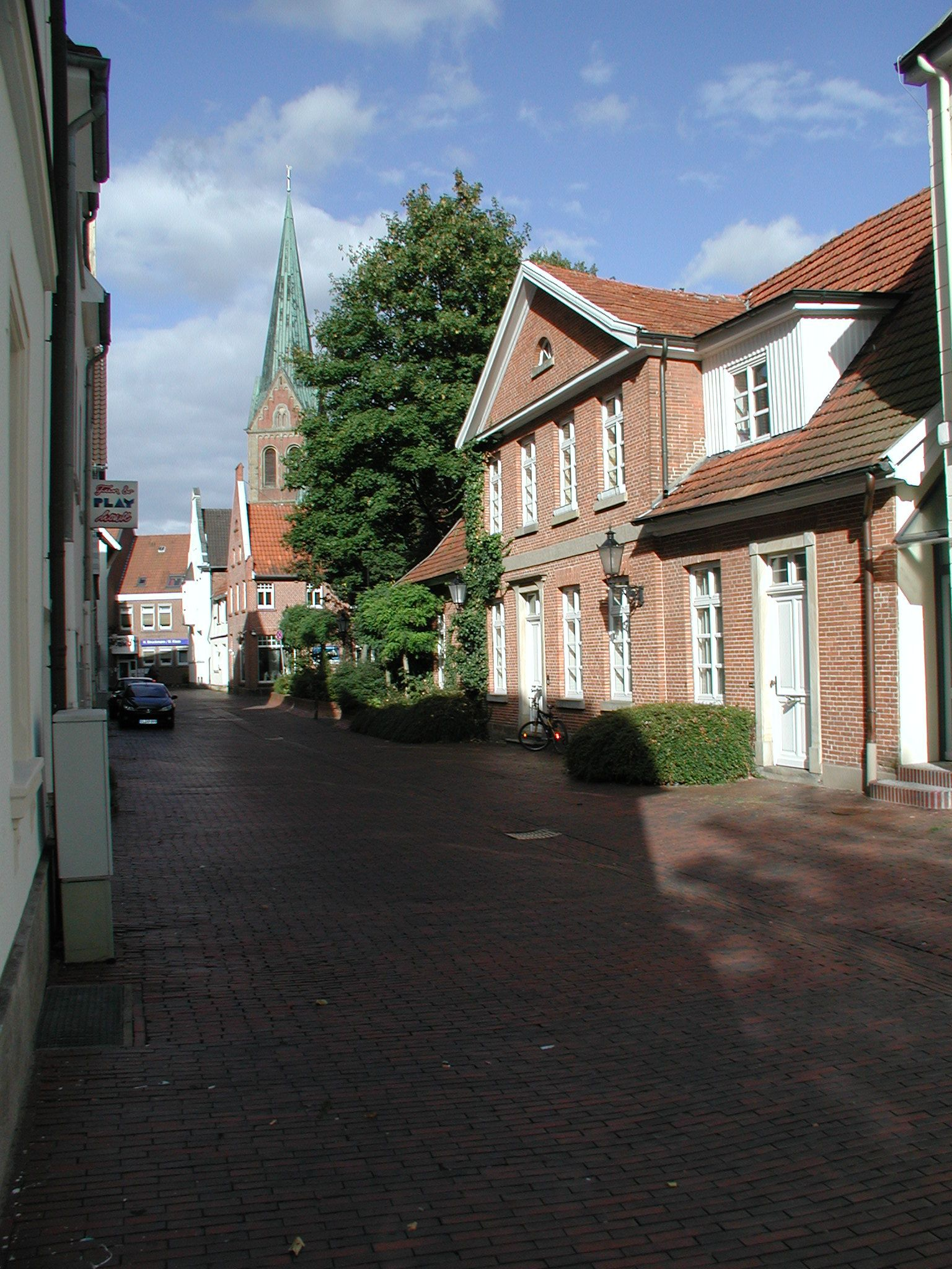 Castellstraße, Lingen (Ems), Germany